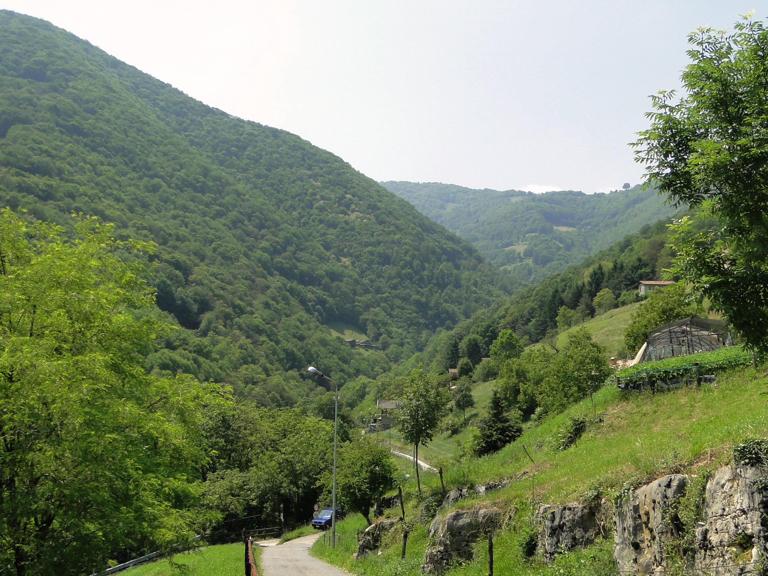 val di Platz. Gazzaniga (BG), Italia